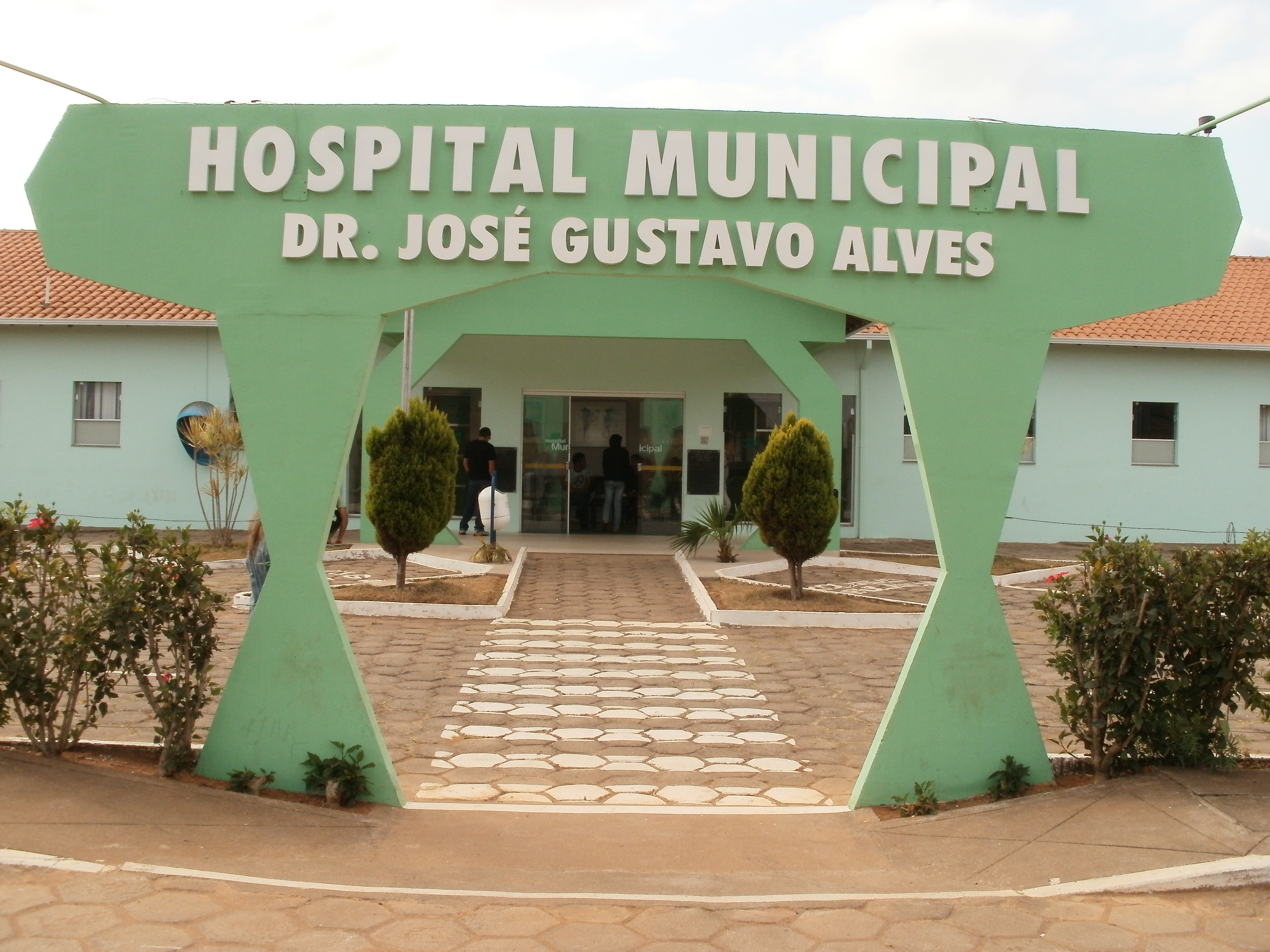 Andrelândia (MG), Brazil Hospital Municipal Dr. José Gustavo Alves, situado na Rua Dr. Walter Octacílio Silva, em Quincas Tibúrcio, Andrelândia.